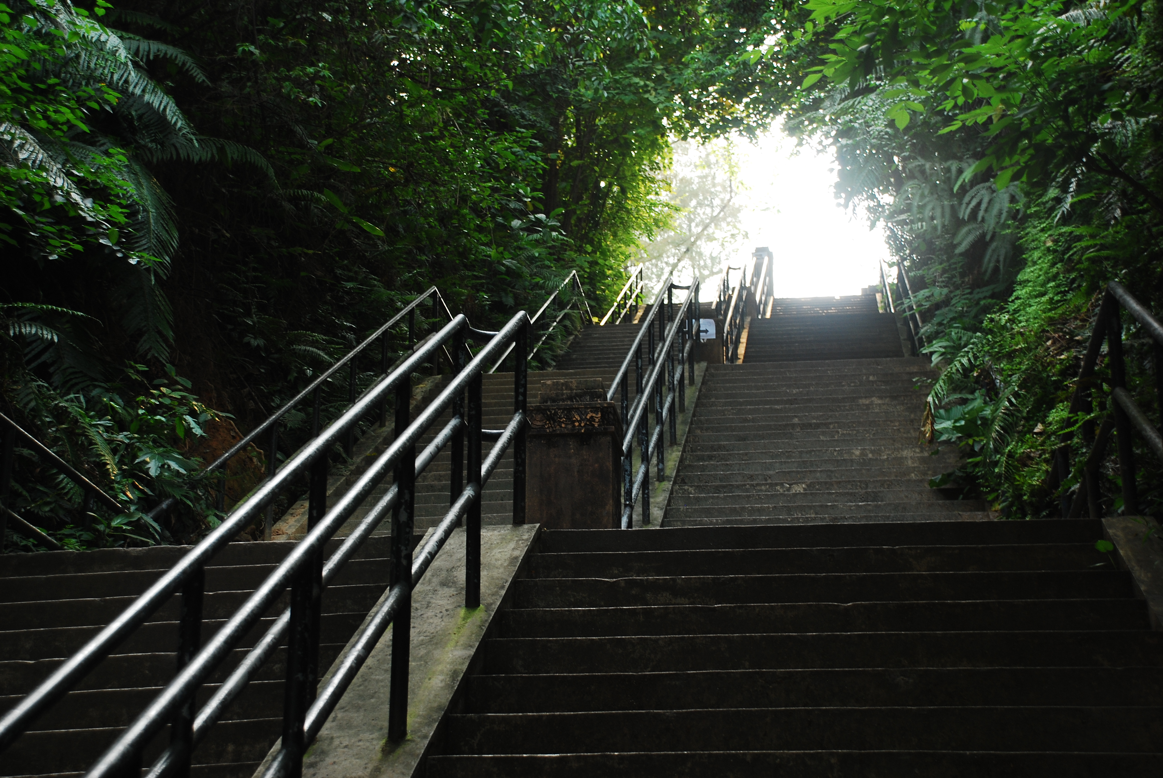 中文（中国大陆）: 位于华南理工大学12号楼阶梯